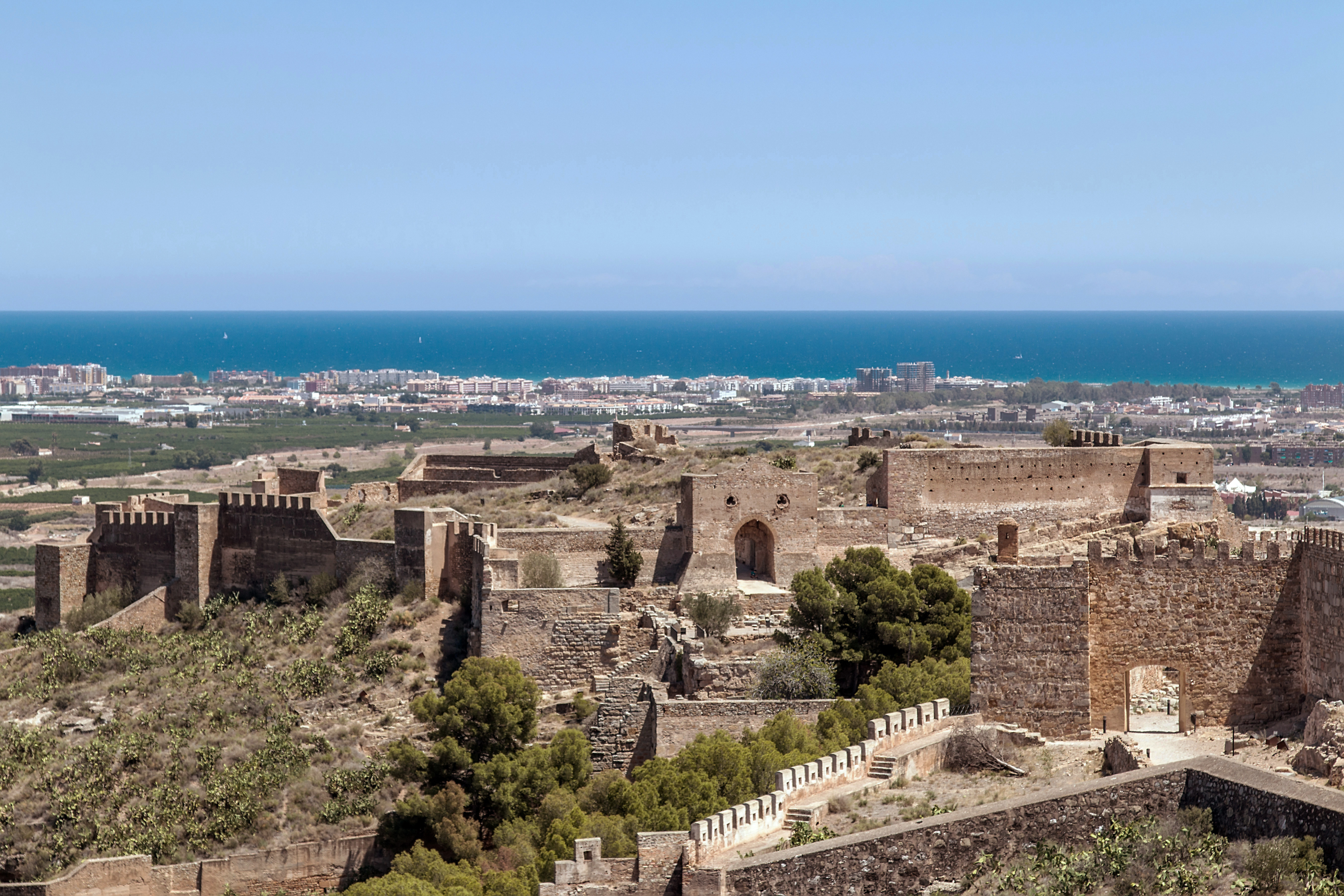 Panorama du château de Sagonte (Sagonte, Province de Valence, Espagne).